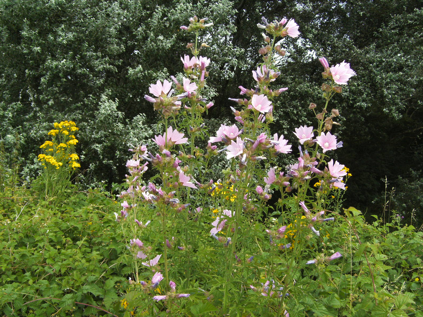 Bestandsnaam is fout; het is muscus kaasjeskruid (Málva moscháta). Juli 2010, Landtong Rozenburg